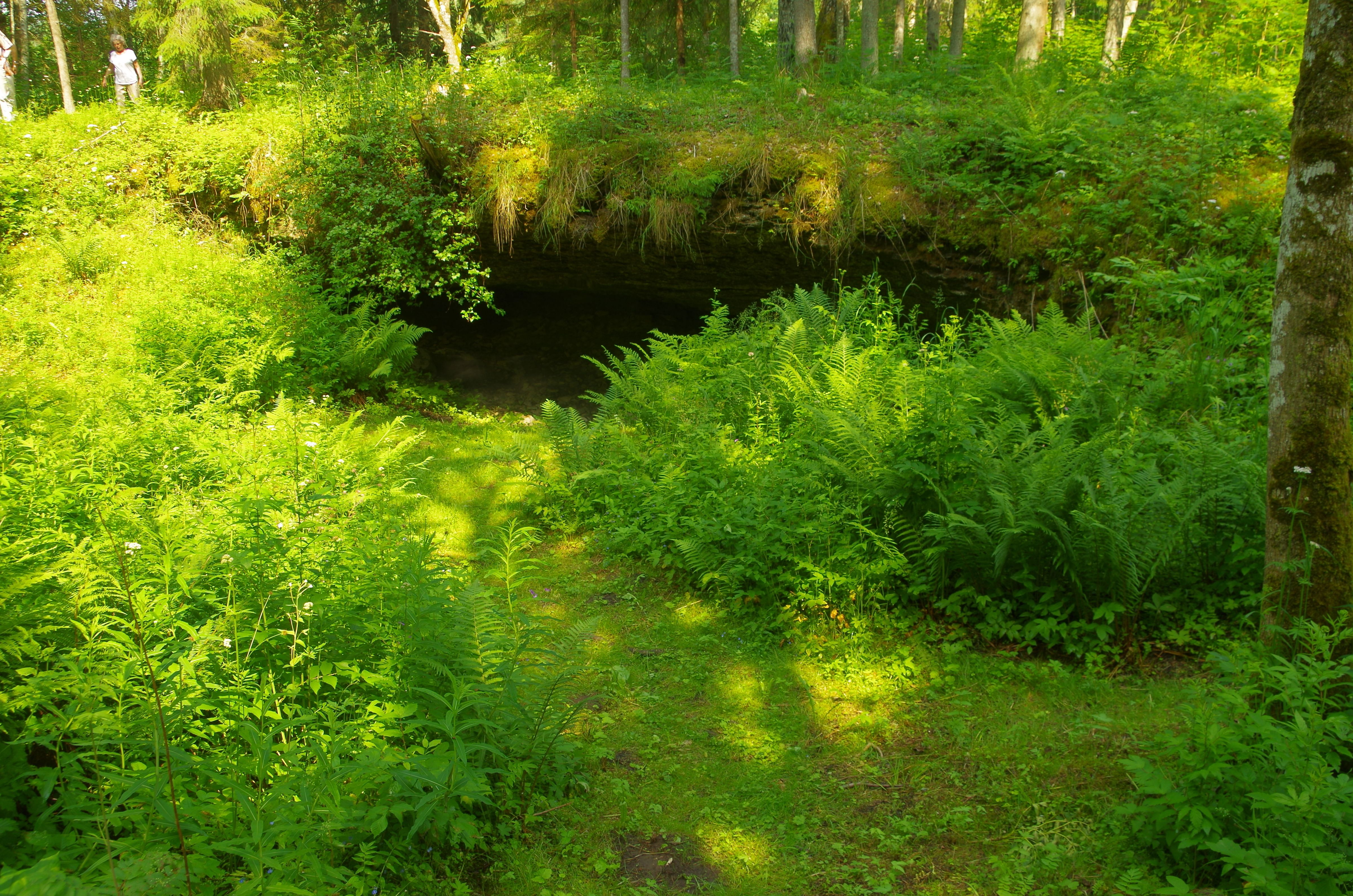 Kuimetsa karstiala kaitseala asub Raplamaal Kaiu vallas. Tuntud ka kui Iida urked. Karstiala võeti kaitse alla 1959. aatal Kuimetsa urgete nime all. Siin esineb rohkelt langatuslehtreid ja –nõgusid. Samuti koopaid, mille kõrgus ulatub kohati 2,5 ja pikkus üle 20 meetrini.